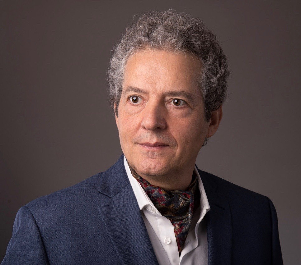 LVB in 2017